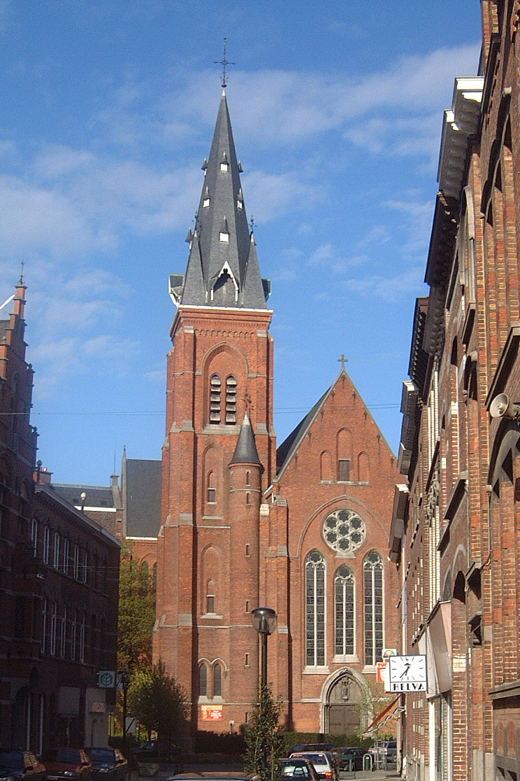 Sint-Martinus, Ronse - Noordkant, zicht van uit de Charles Vandendoorenstraat